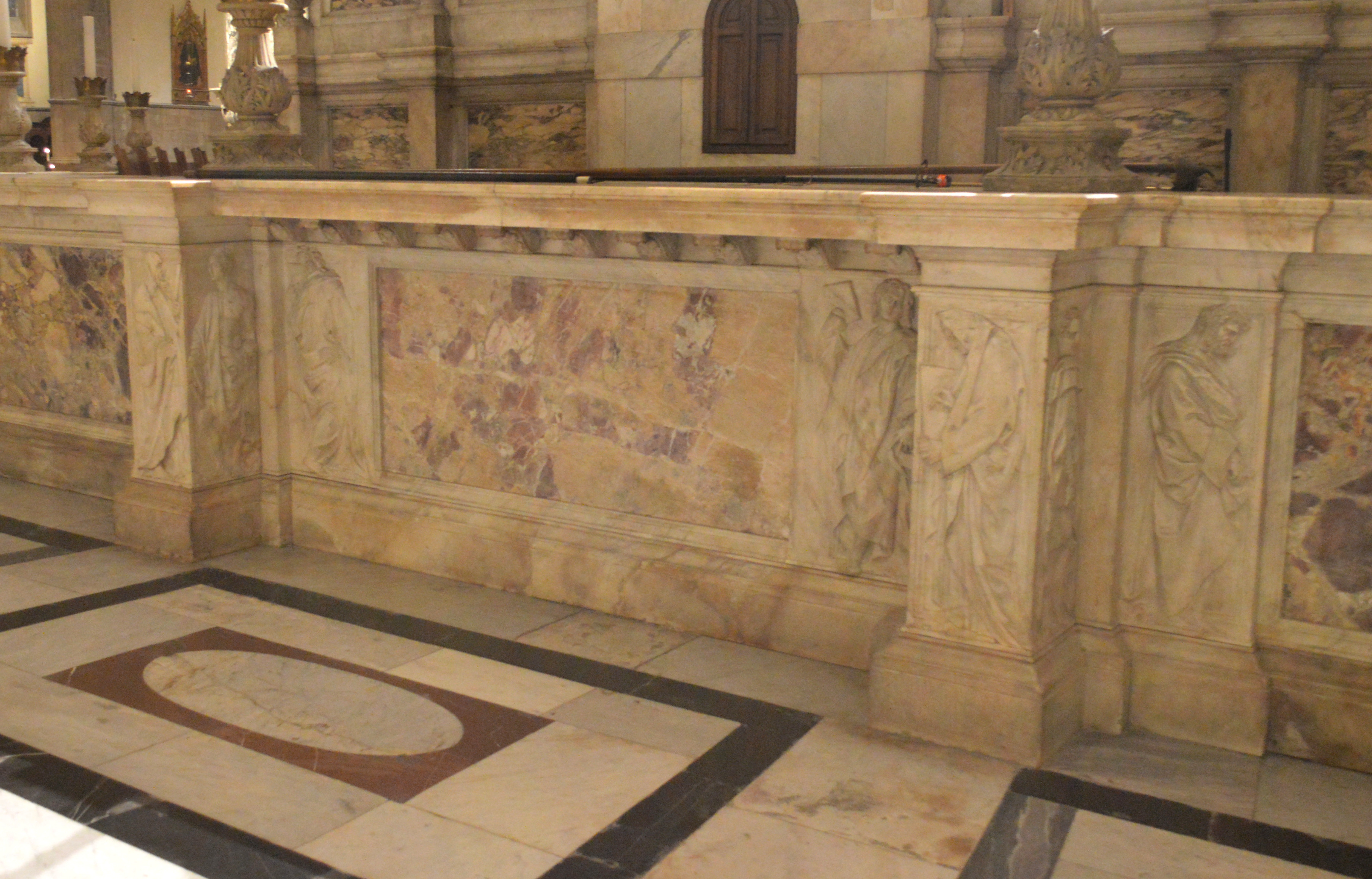 Elementi originali aggettanti del lato est del recinto del coro.